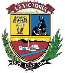 Escudo del municipio José Félix Ribas, estado Aragua, Venezuela